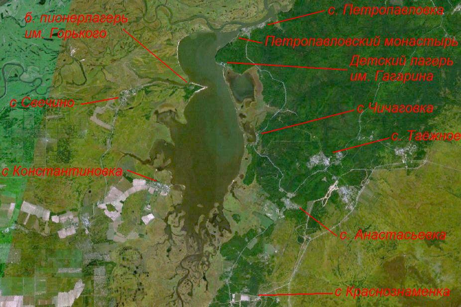 Петропавловское озеро, Хабаровский край. Космический снимок NASA World Wind. Этот файл является производным от файла